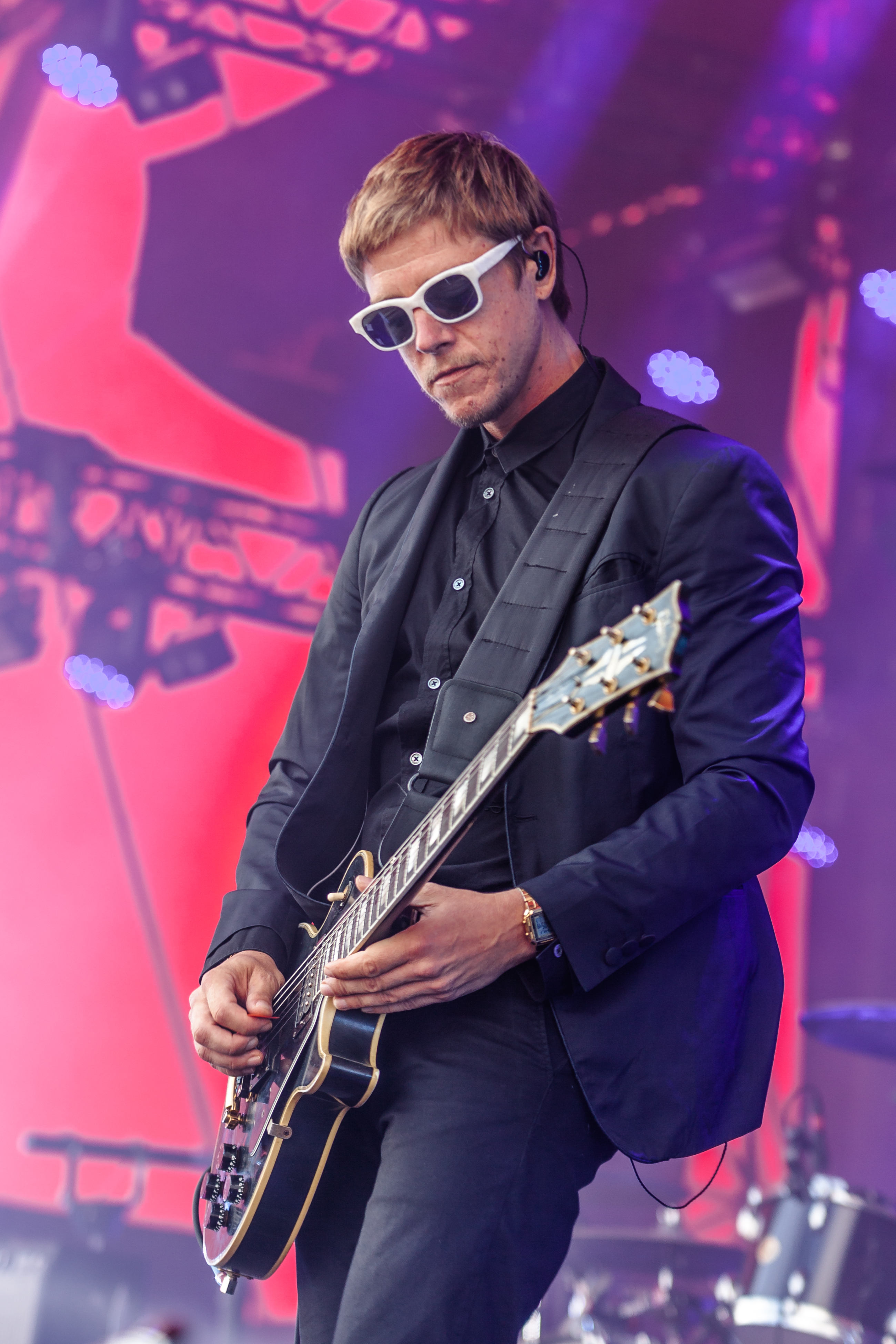 Festivalsommer This photo was created with the support of donations to Wikimedia Deutschland in the context of the CPB project "Festival Summer".